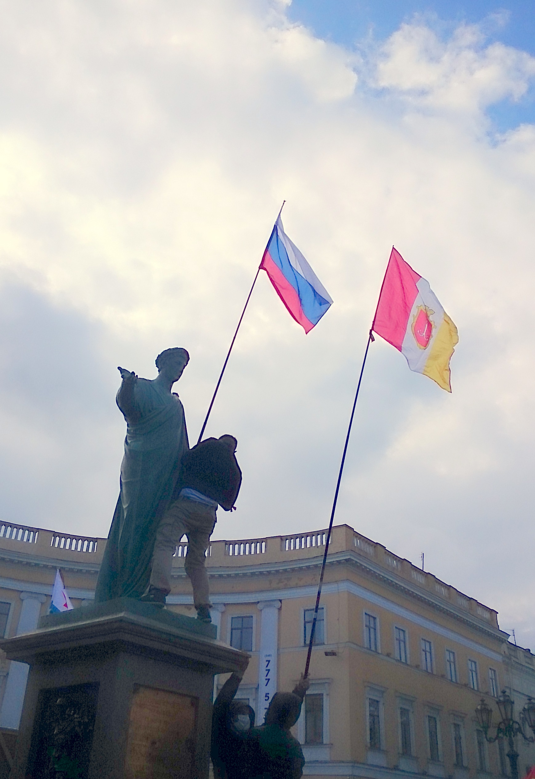 Флаги России и Одессы возле «Дюка» (памятника герцогу Ришелье)